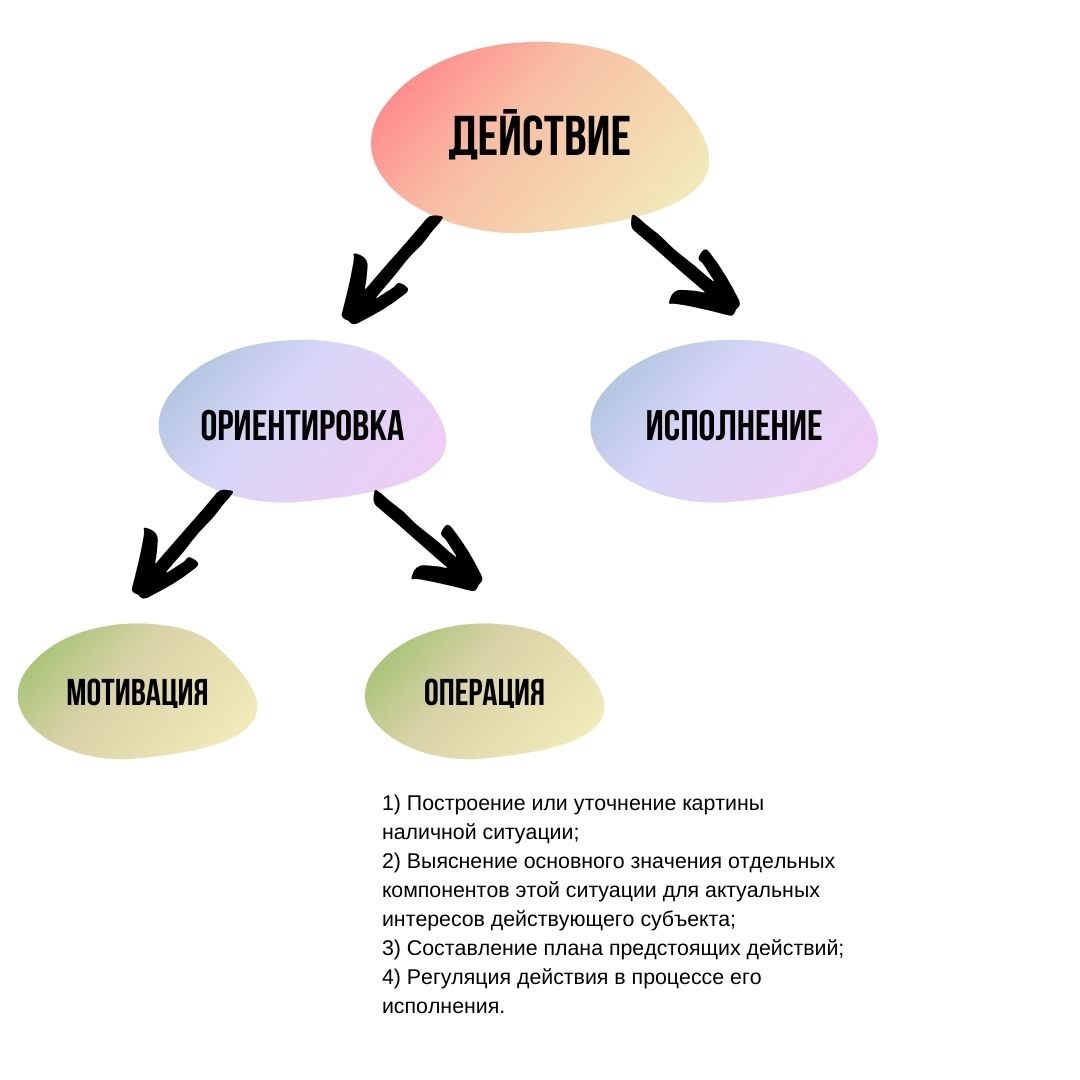 Каждое умственное действие имеет ориентировочный и исполнительный компоненты, ориентировка, в свою очередь, имеет мотивационный компонент и операциональный. Операция далее состоит из четырех этапов.